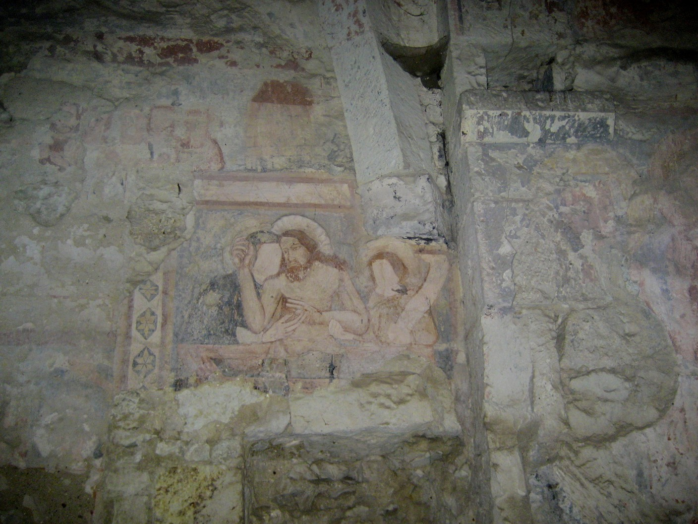 midages Fresco-paintings in the church of Homorod, Wandmalereien Kirchenburg Hamruden/ Siebenbürgen